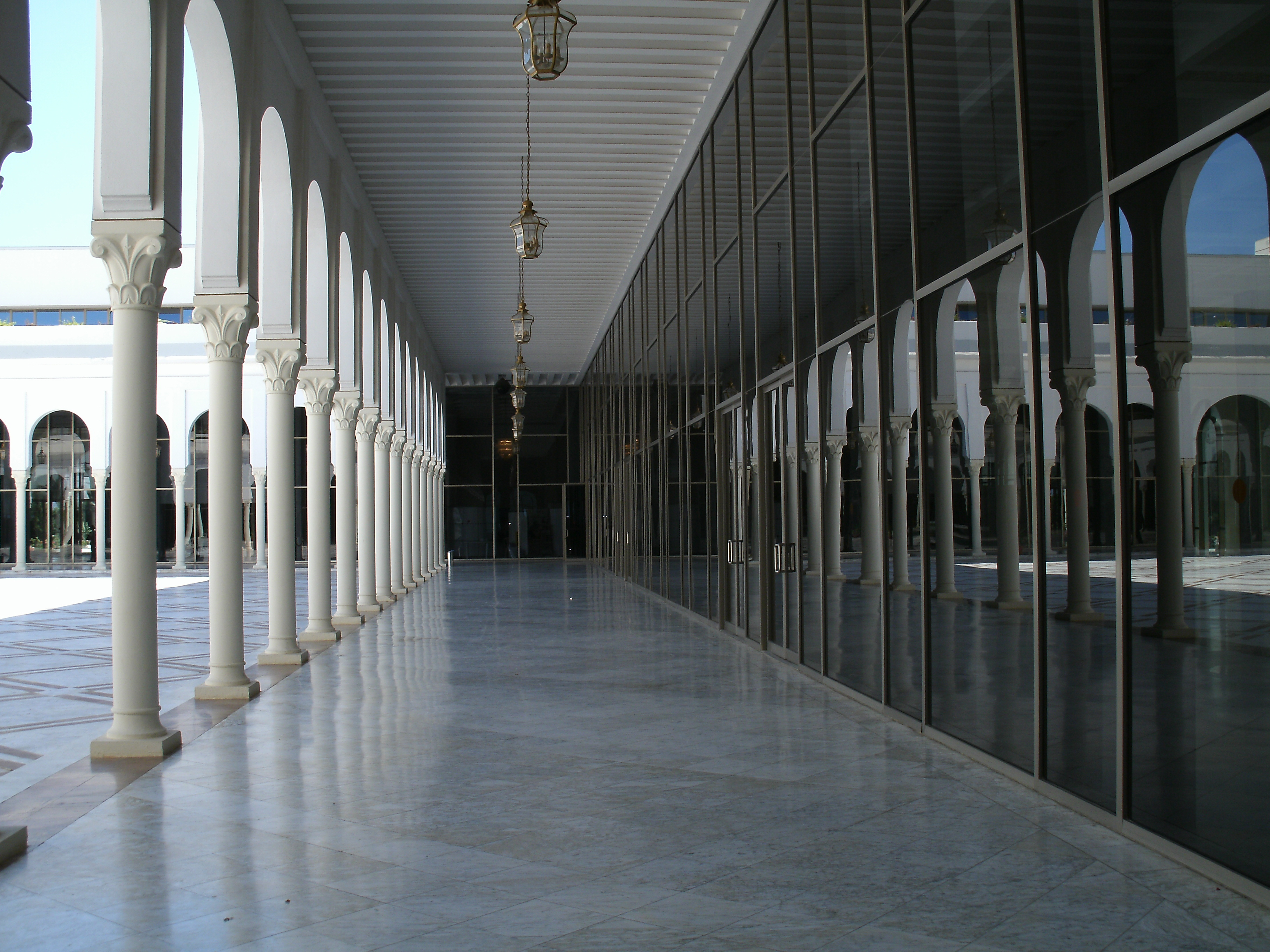 Palais de la Culture Moufdi Zakaria à Alger (Algérie).